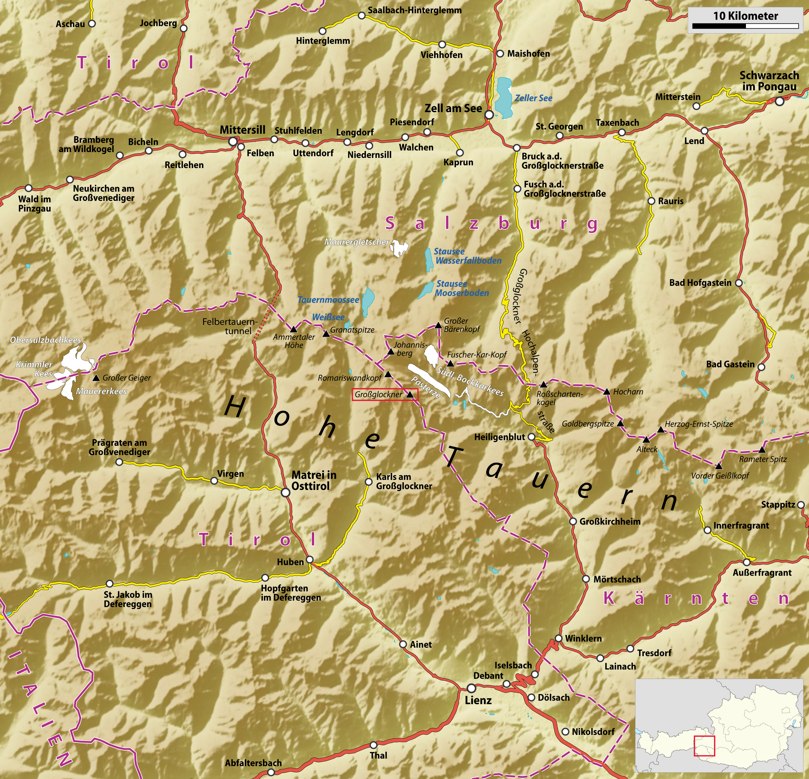 Karte des mittleren Teils der Hohen Tauern mit Hervorhebung des Großglockners